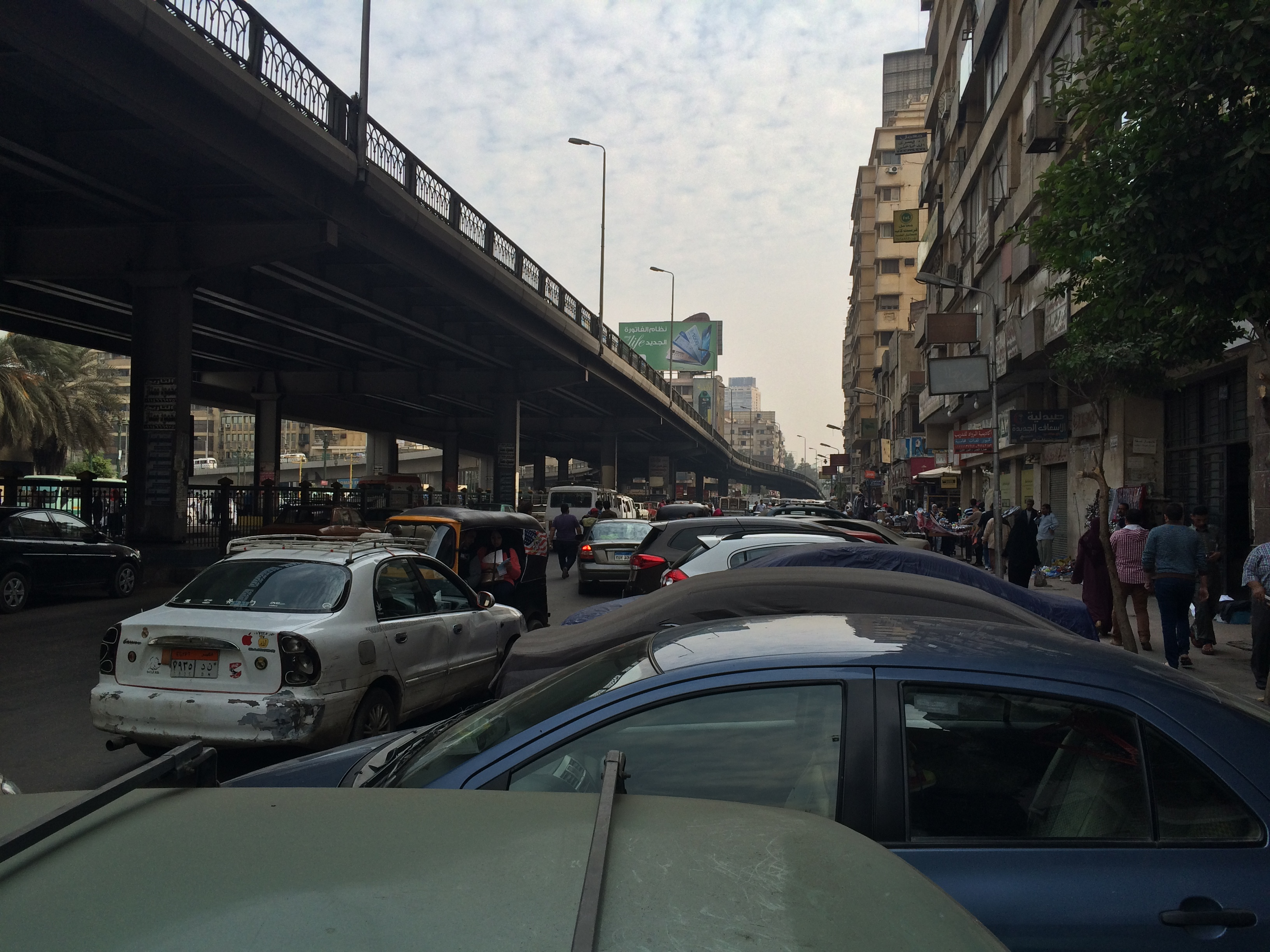 Giza Square - ميدان الجيزه